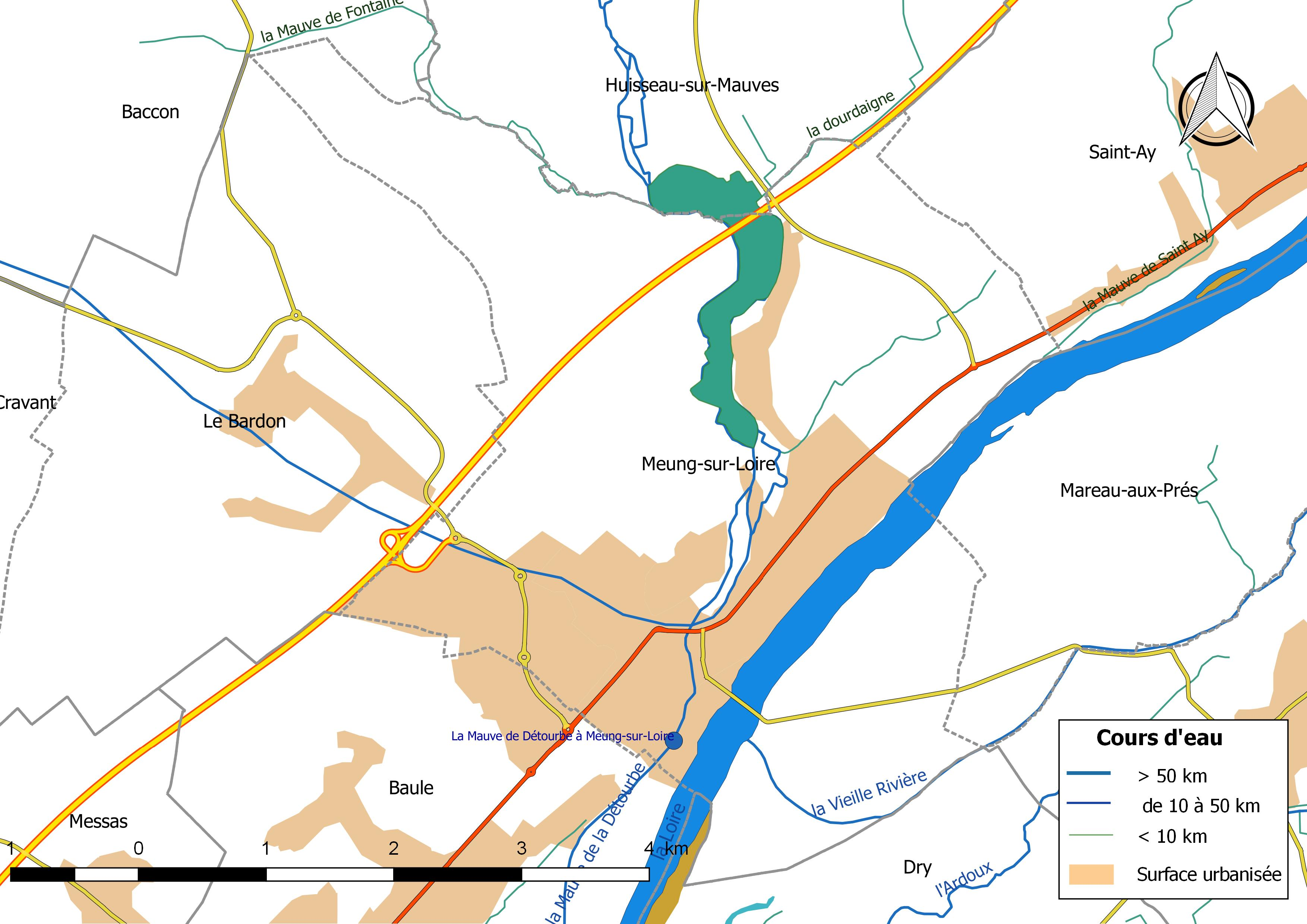 Carte du réseau hydrographique de la commune de Meung-sur-Loire (France).